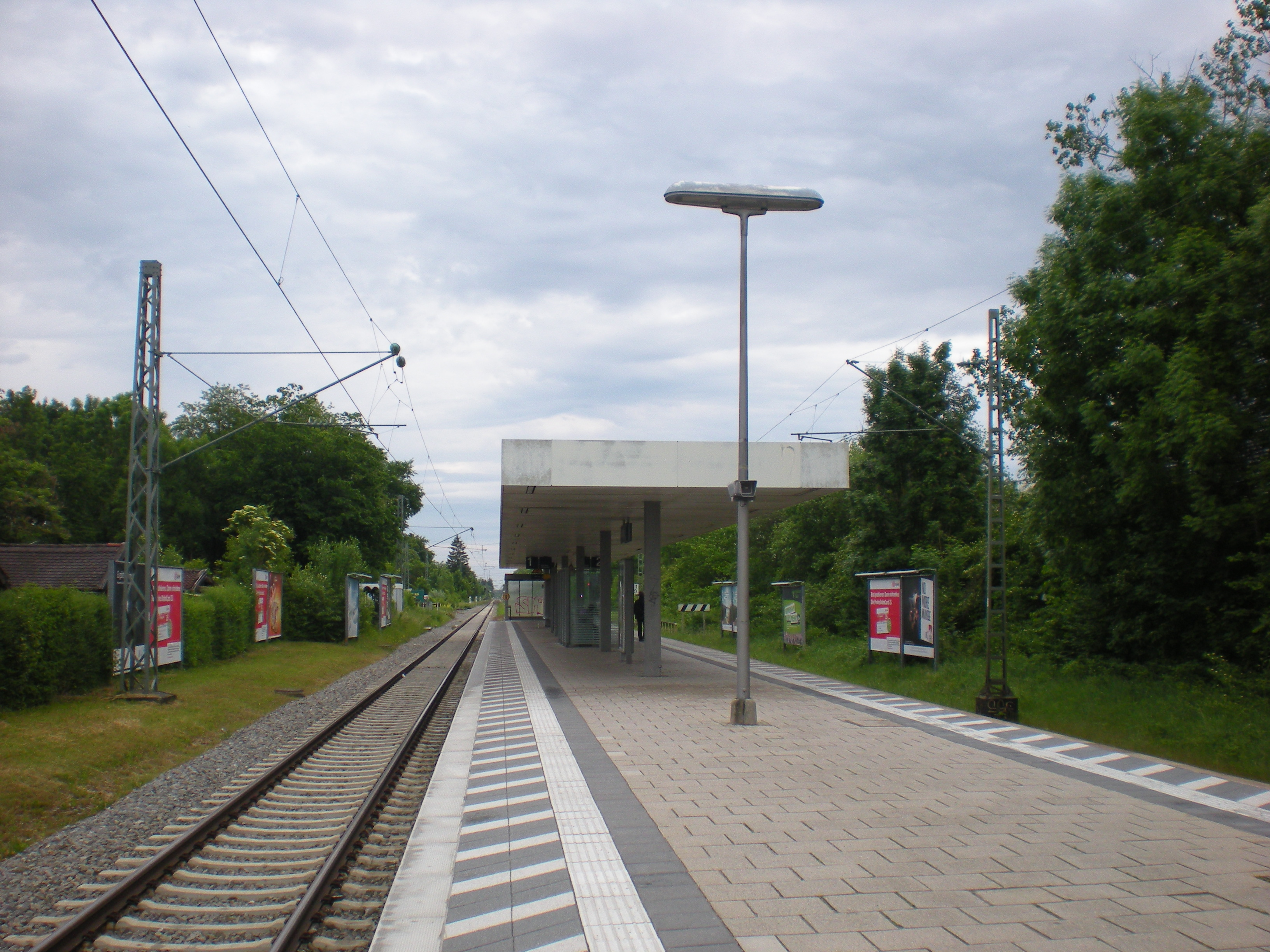 Bahnsteig des S-Bahnhofs München-Aubing